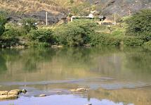 Rio Paraíba do Sul em Além Paraíba-MG